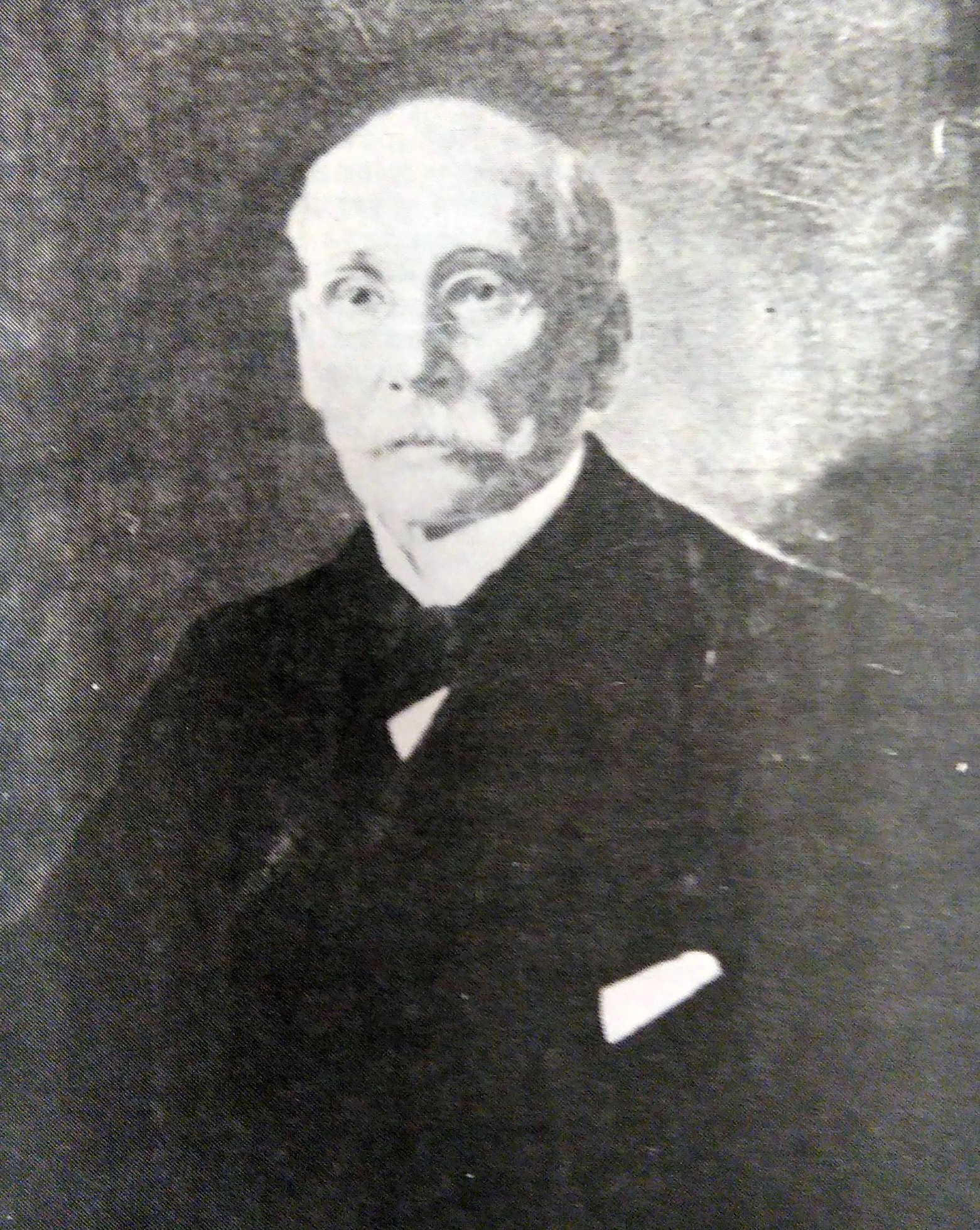 Retrato del Gobernador de la Provincia de Entre Ríos, Miguel Laurencena (1914-1918). Galería de los Gobernadores. Casa de Gobierno de la Provincia de Entre Ríos. Paraná.